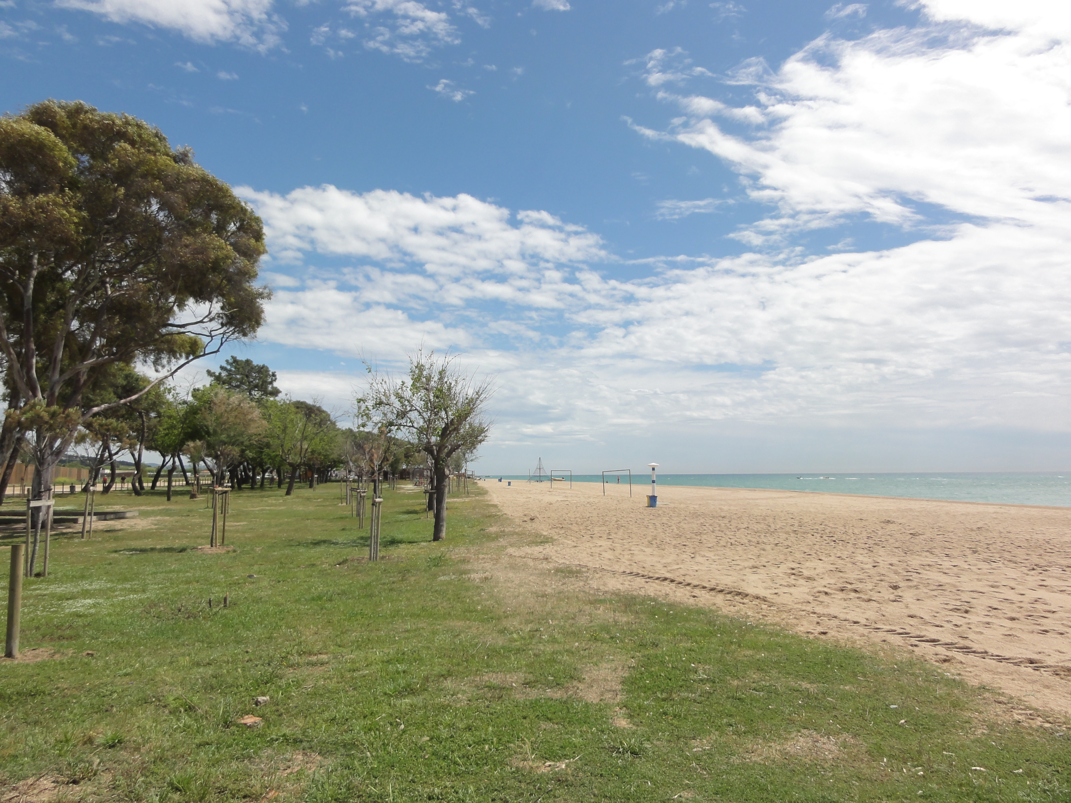 Platja de Pineda (Pineda de Mar) This is a a photo of a beach in Catalonia, Spain, with id: PL-CT-17003-199